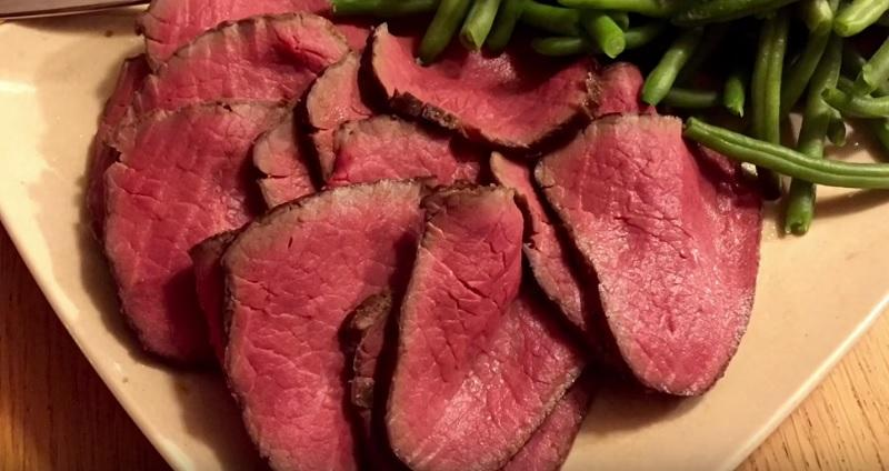 Skiver af roastbeef tilberedt sous vide, anrettet og klar til servering.